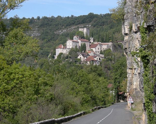 Montbrun (département du Lot, France)